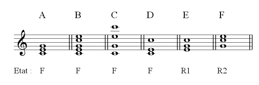 Description : Position et état de l'accord Source : Personnelle Licence : GFDL